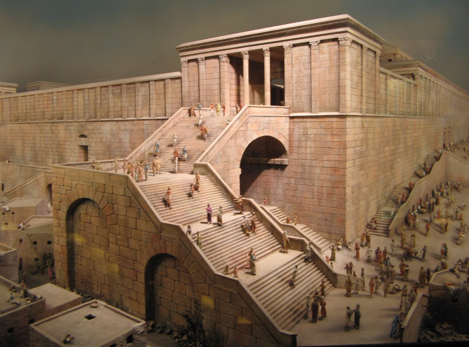 Древний Иерусалим, реконструкция. Reconstruction model in Museum of David Castle.